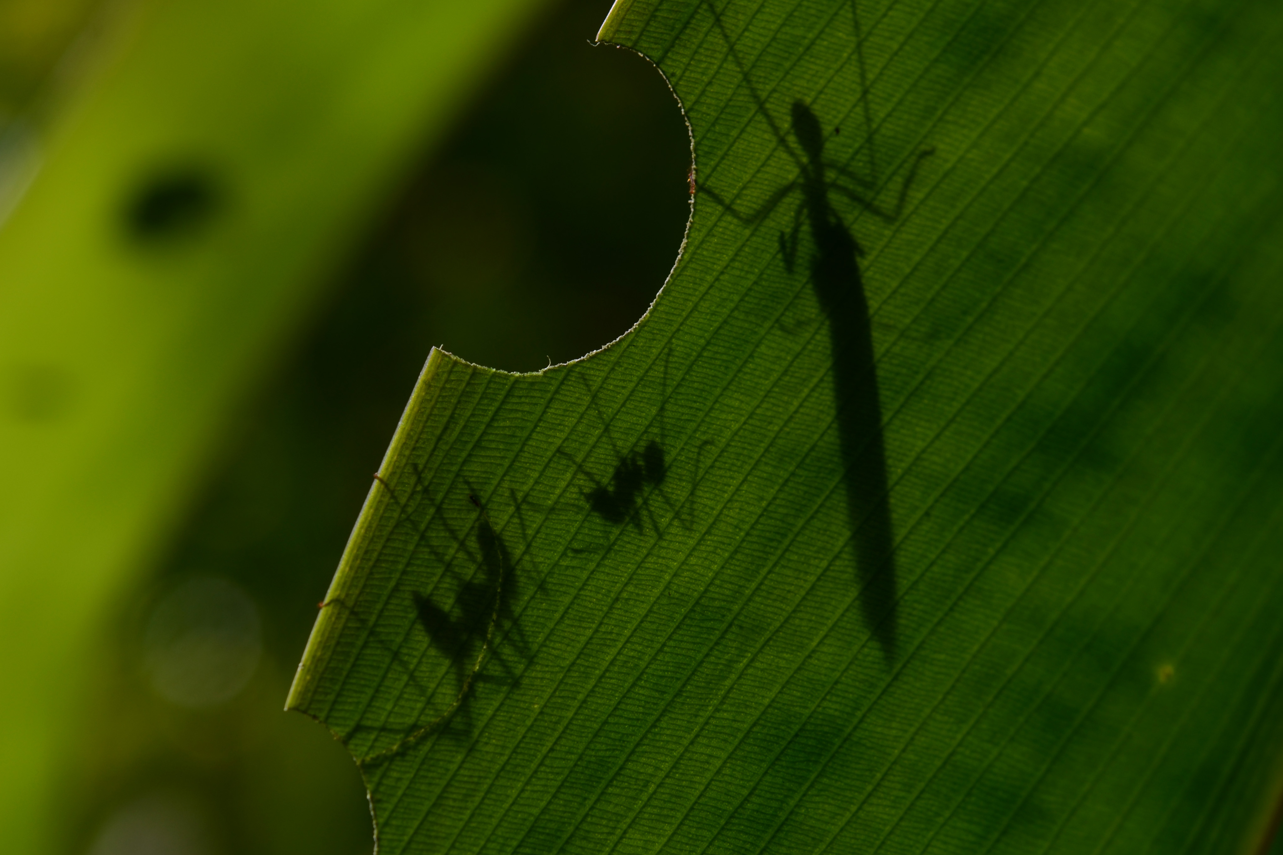 Formicidae: Atta sp. found at La Selva Biological Station, Sarapiqui, Costa Rica